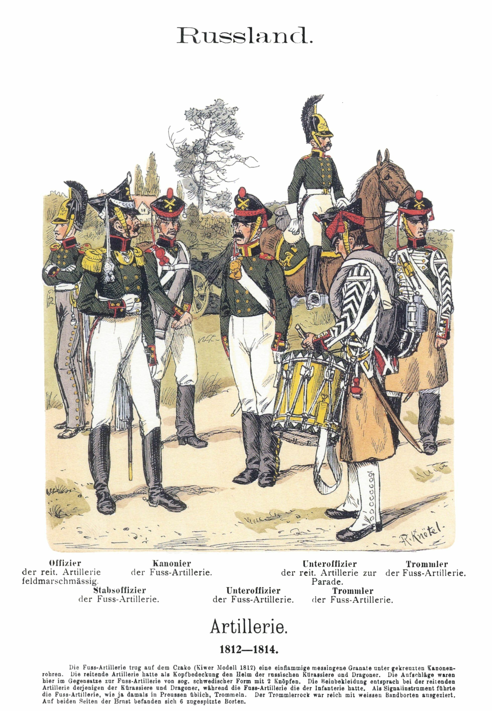 Иллюстрация Рихарда Кнотеля